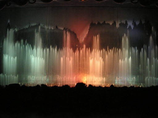 Foto van het Waterorgel in de Efteling.